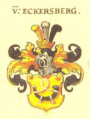 Wappen der Thüringischen und Fränkischen Adelsfamilie Eckersberg